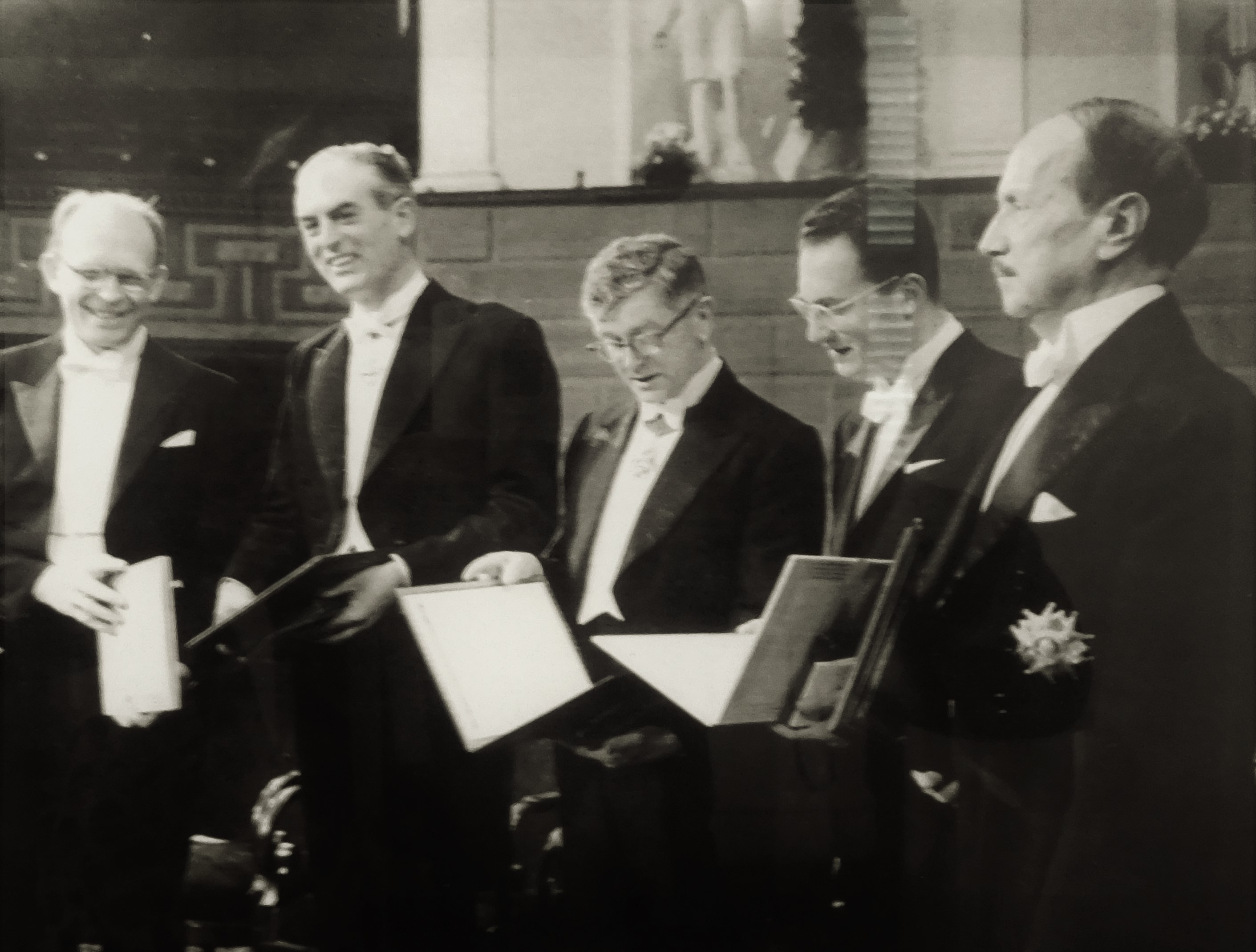 Cérémonie de remise du prix Nobel à Stockholm le 10 décembre 1960 (Musée Saint John Perse)